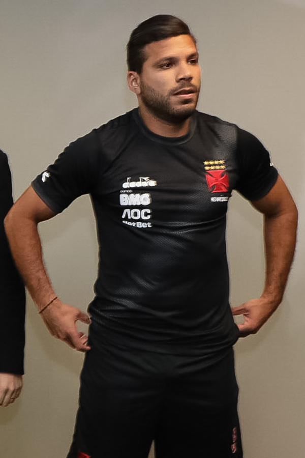 (São Paulo - SP, 27/07/2019) Presidente da República, Jair Bolsonaro, assiste à partida de futebol entre Palmeiras x Vasco da Gama, válida pelo campeonato brasileiro 2019. Foto: Marcos Corrêa/PR